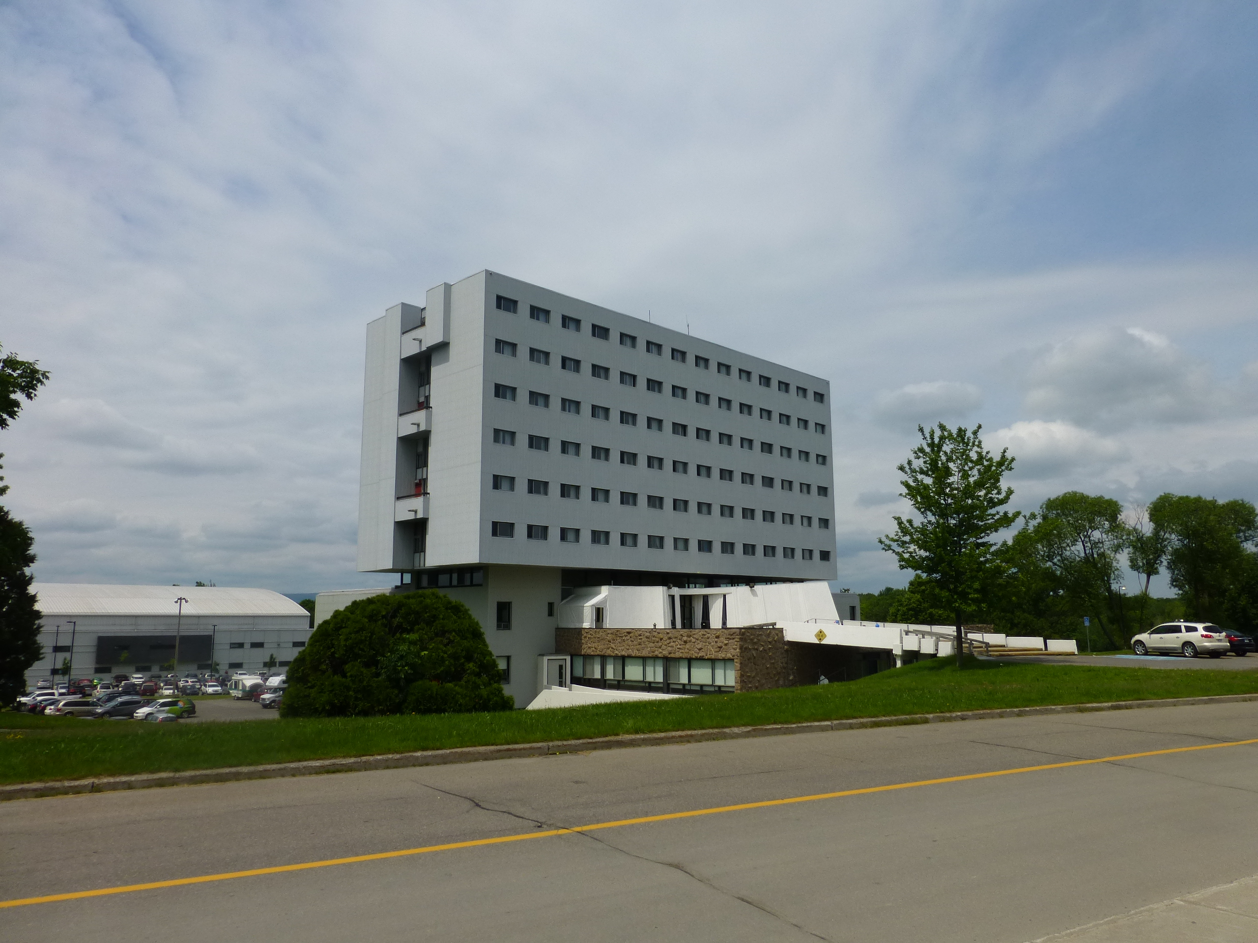 Résidence De-La Mennais, qui fait partie du Campus Notre-Dame-de-Foy, à Saint-Augustin-de-Desmaures, Québec, Canada.